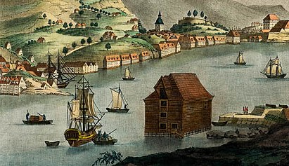 La vile de Bergen prise d' une Batterie nommé Hæggrénssetdetail